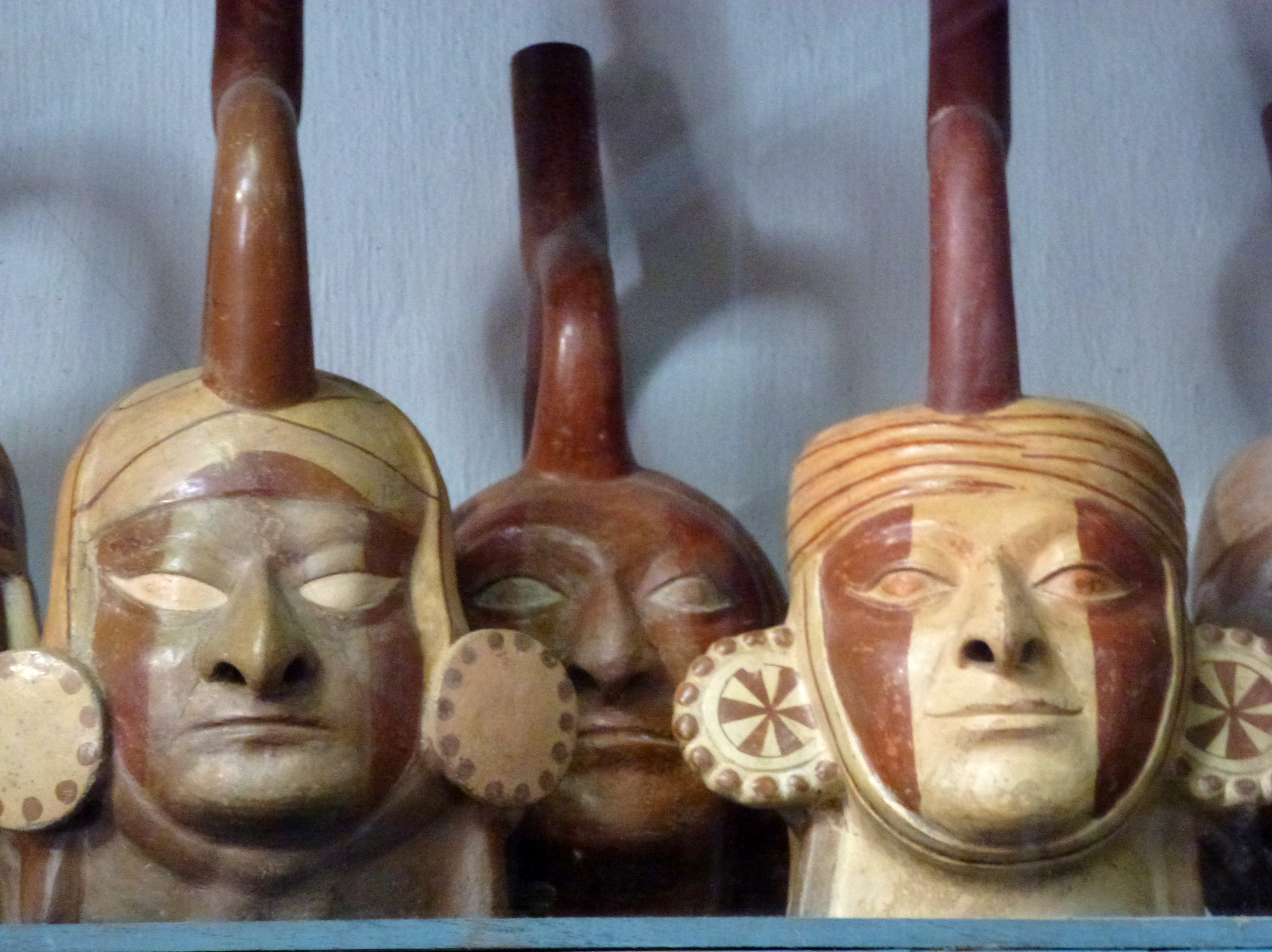 Museo Arqueológico Rafael Larco Herrera Lima Pérou